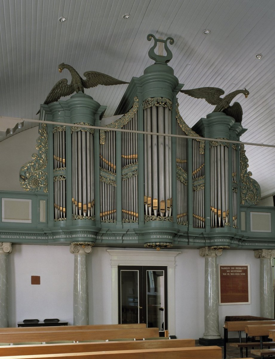 Nederlands Hervormde Kerk: Interieur, aanzicht orgel, orgelnummer 1010 (opmerking: Gefotografeerd voor Het Historische Orgel in Nederland 1858-1865)